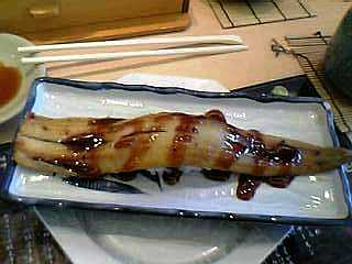 Nigiri "a whole eel"(焼きアナゴ一本握り)